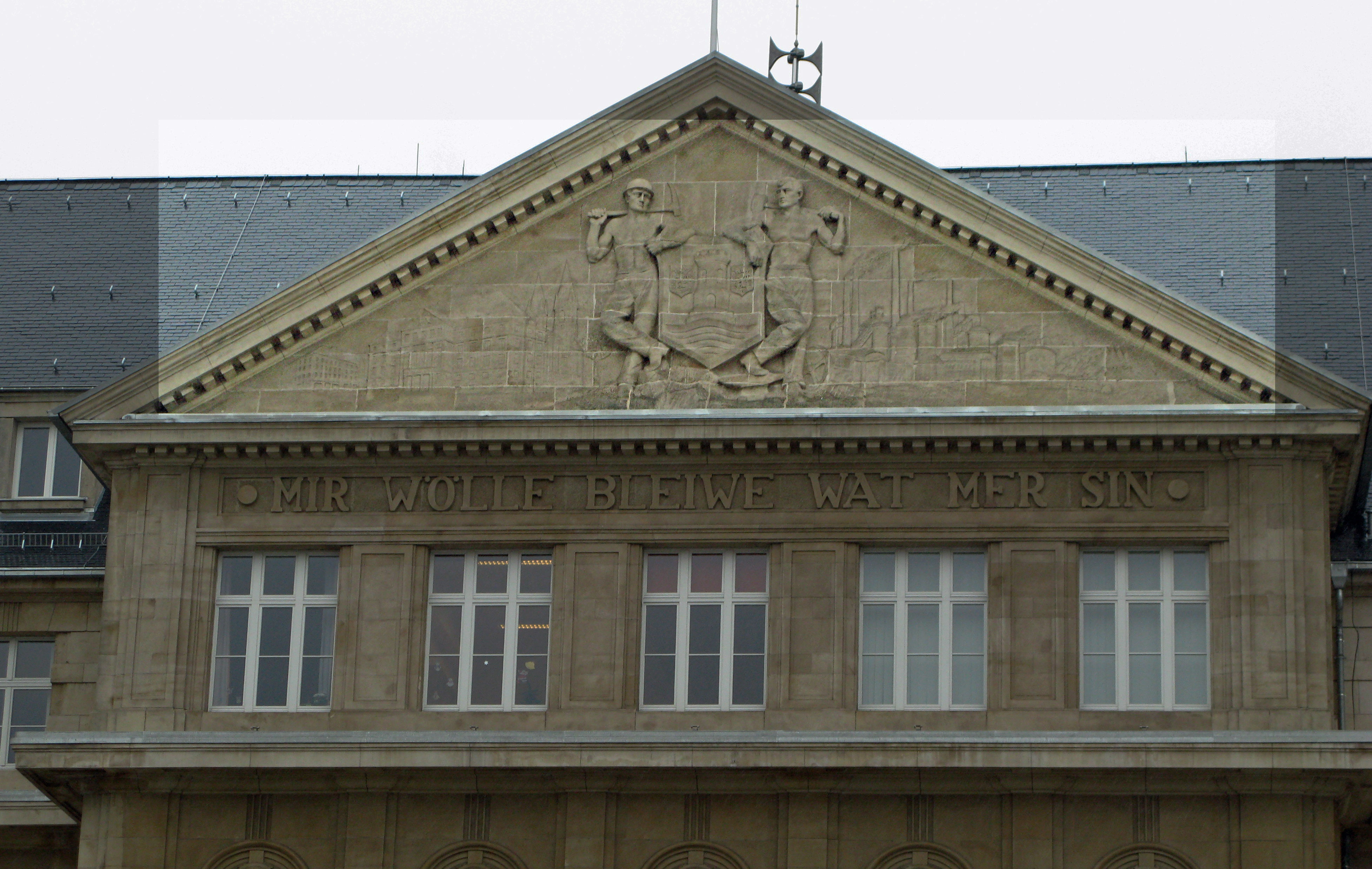 Sujet:Giewelrelief Gemeng Esch-Uelzecht Source:Eege Foto vum User:Cornischong